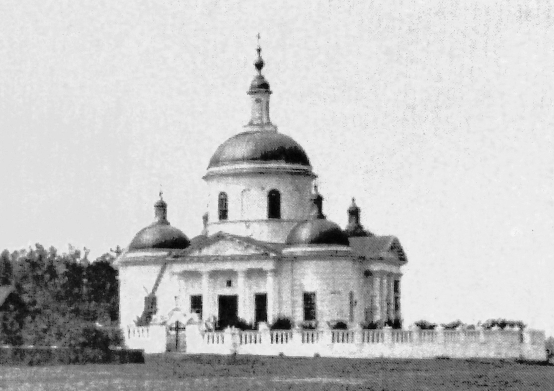 Храм в селе Усолье Шигонского района Построен в 1827 году. Разрушен после 1920 года